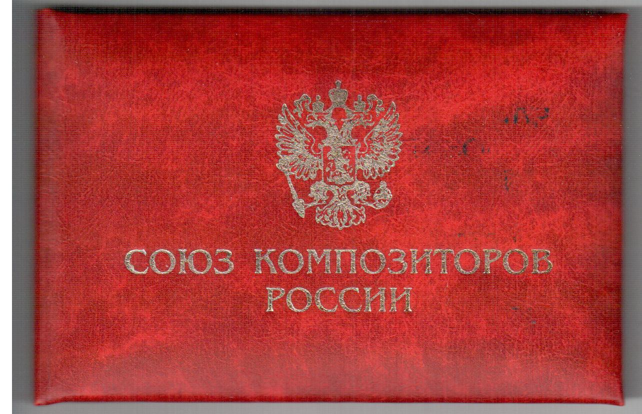 Обложка членского билета Союза композиторов России (2009 г.)